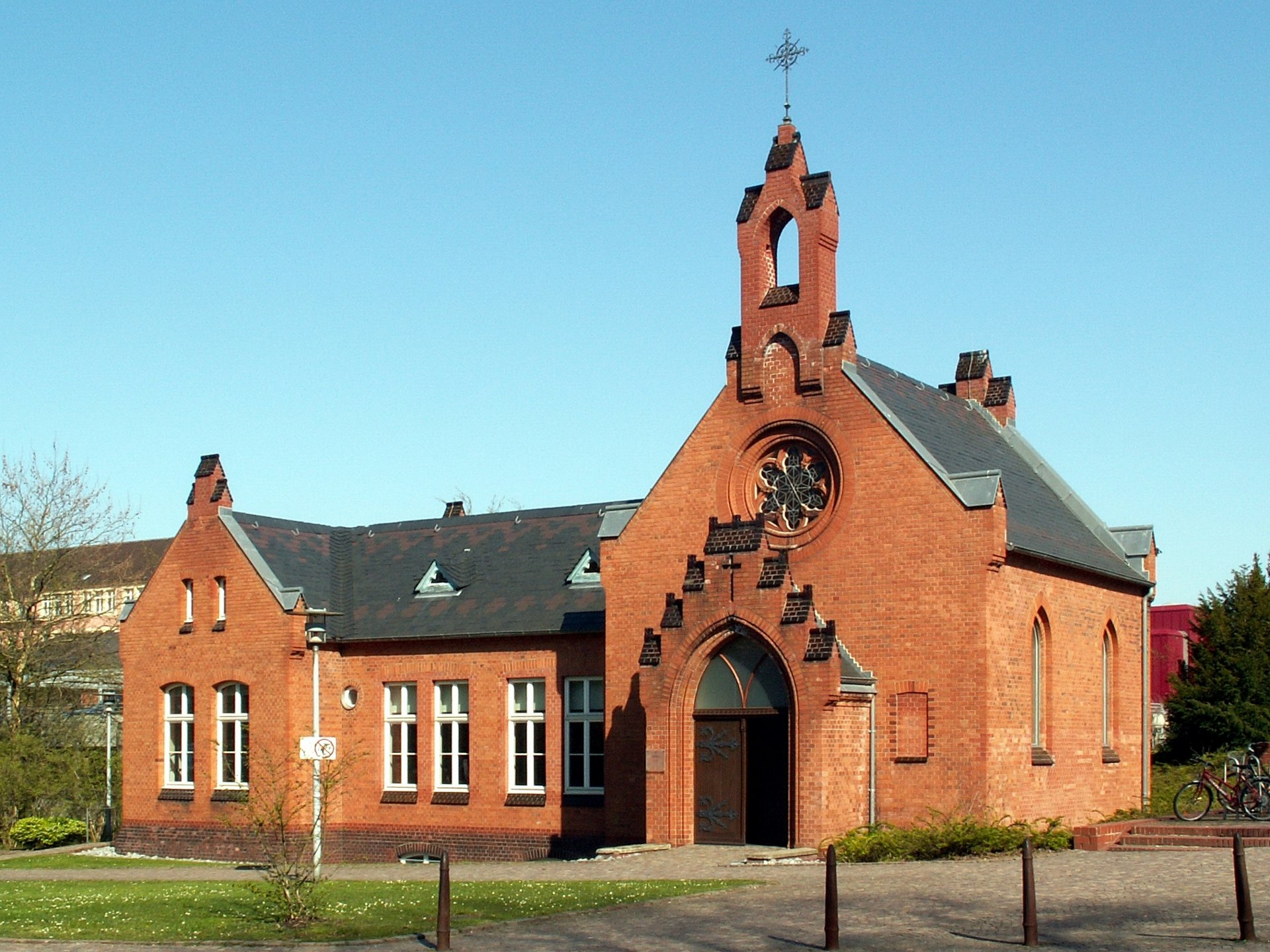 Capella hospitalis in Bielefeld, ehemalige Krankenhauskapelle des Klinikums Mitte, Ansicht von Südwesten